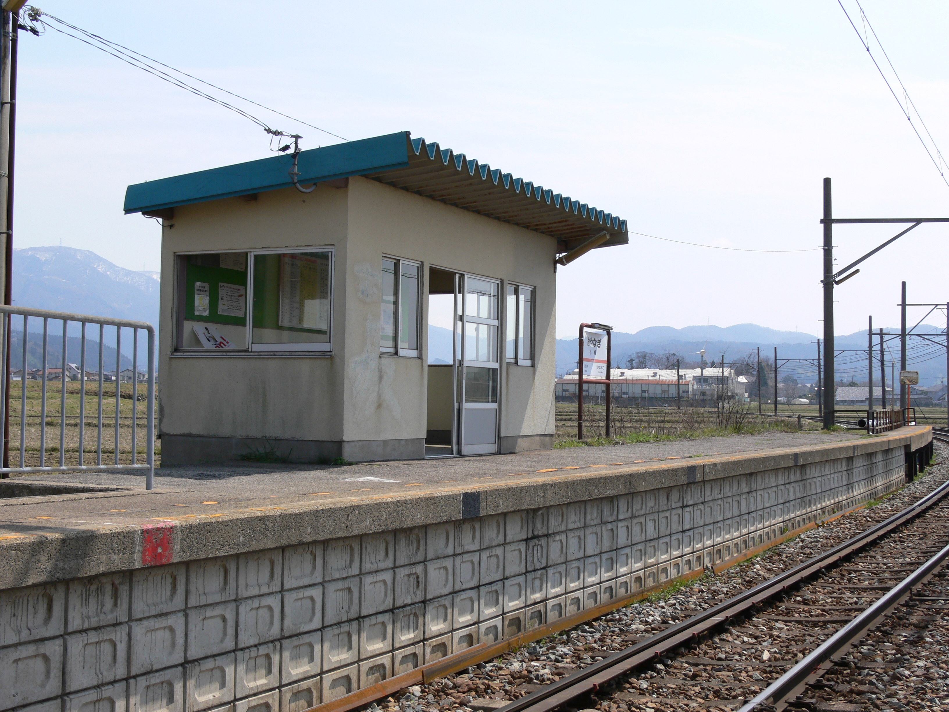 小柳駅